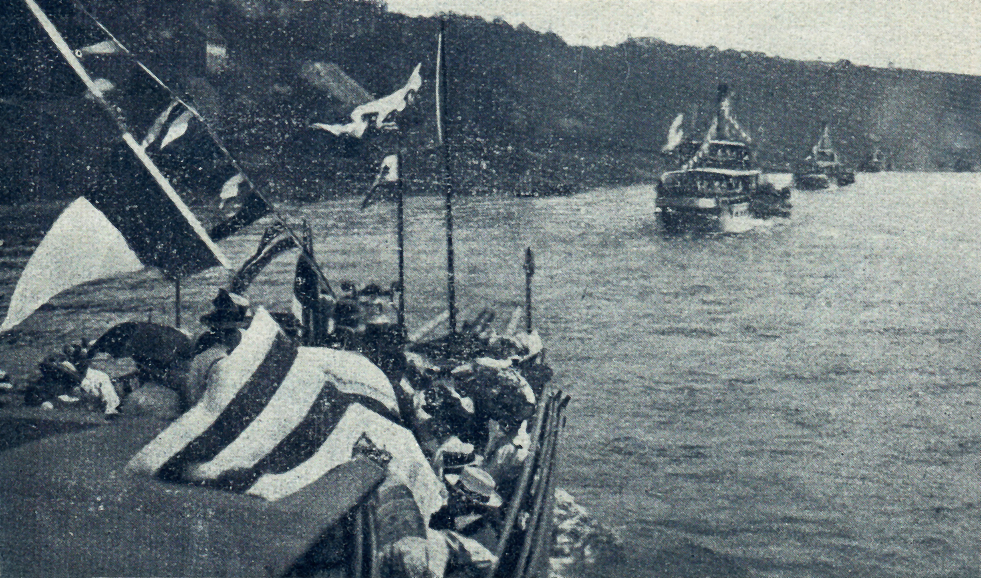 UK 1908. La kvar esperantaj vaporŝipoj